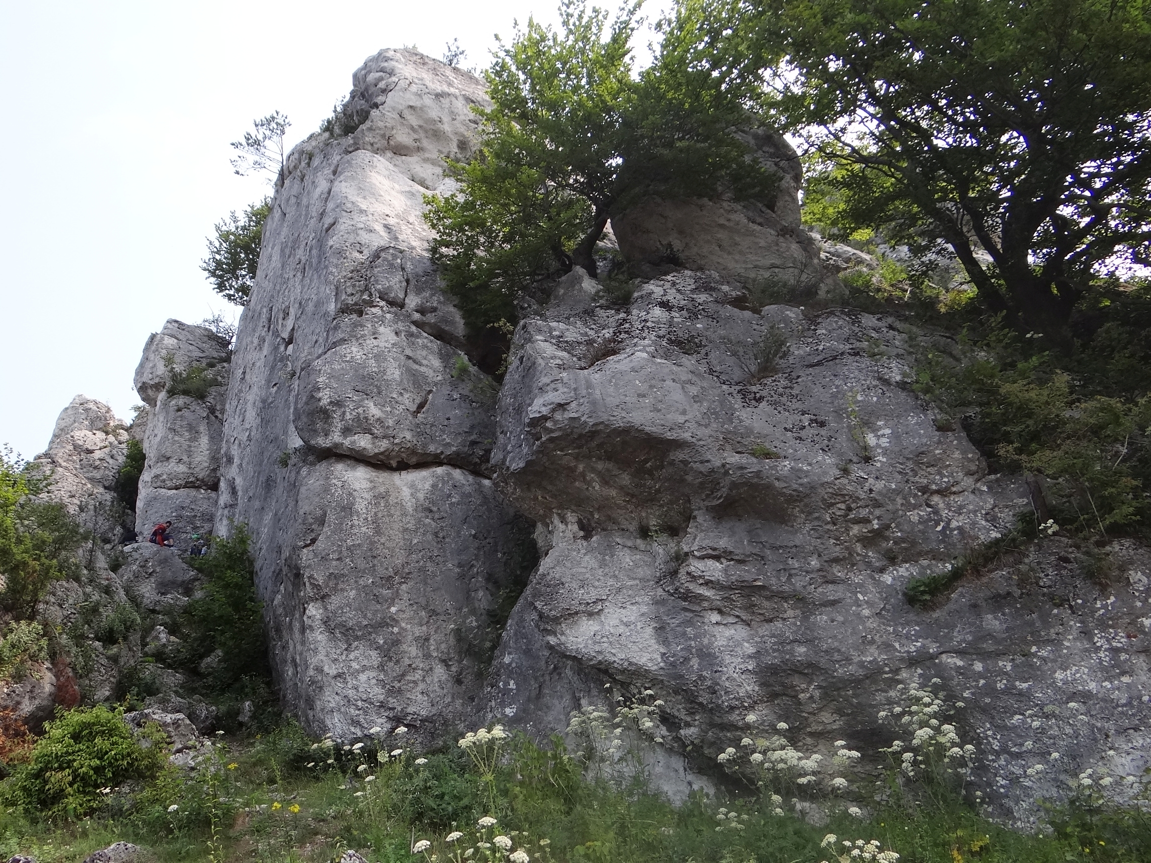 Ściana południowa Długiej Grani na Górze Zborów w Podlesicach